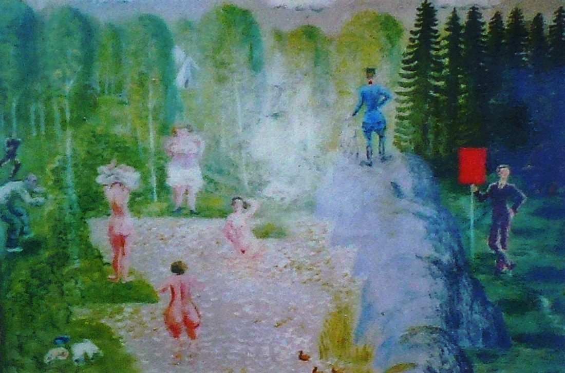 En av (de numera förstörda) väggmålningarn i Tuppstugan